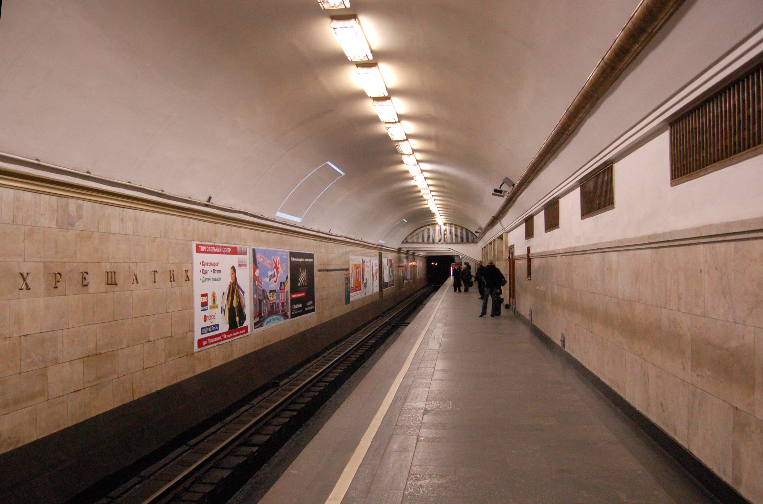 Станция метро «Крещатик», посадочная платформа в сторону станции «Театральная»